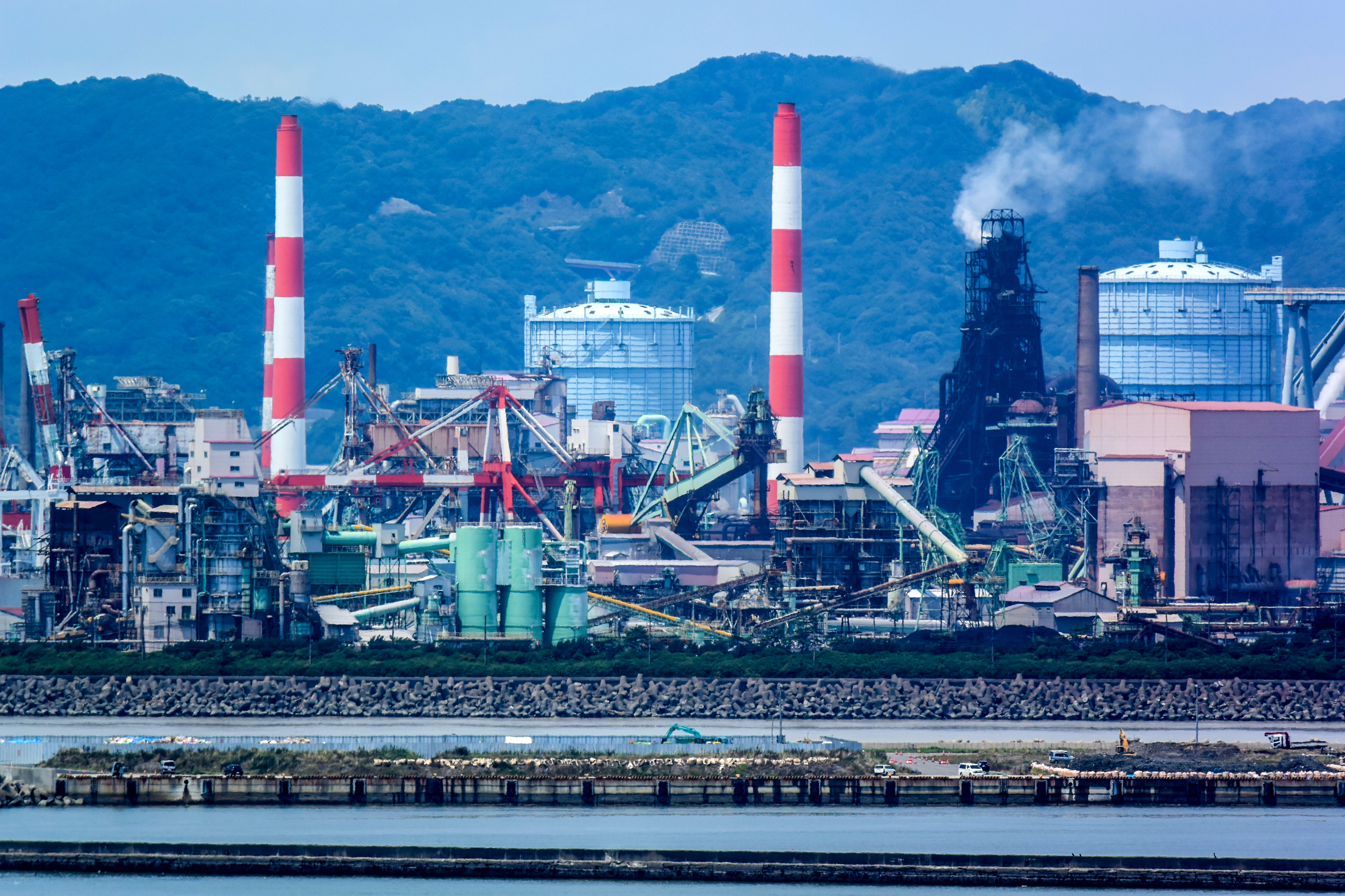 新日鐵住金和歌山製鐵所